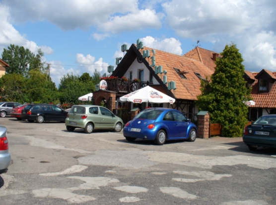 Ogonki k. Węgorzewa